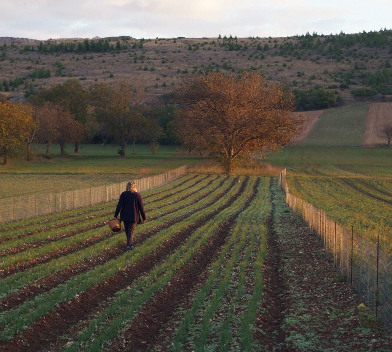 Campo di zafferano a Navelli (Abruzzo): la raccolta si fa il mattino molto presto quando i fiori non sono ancora aperti.